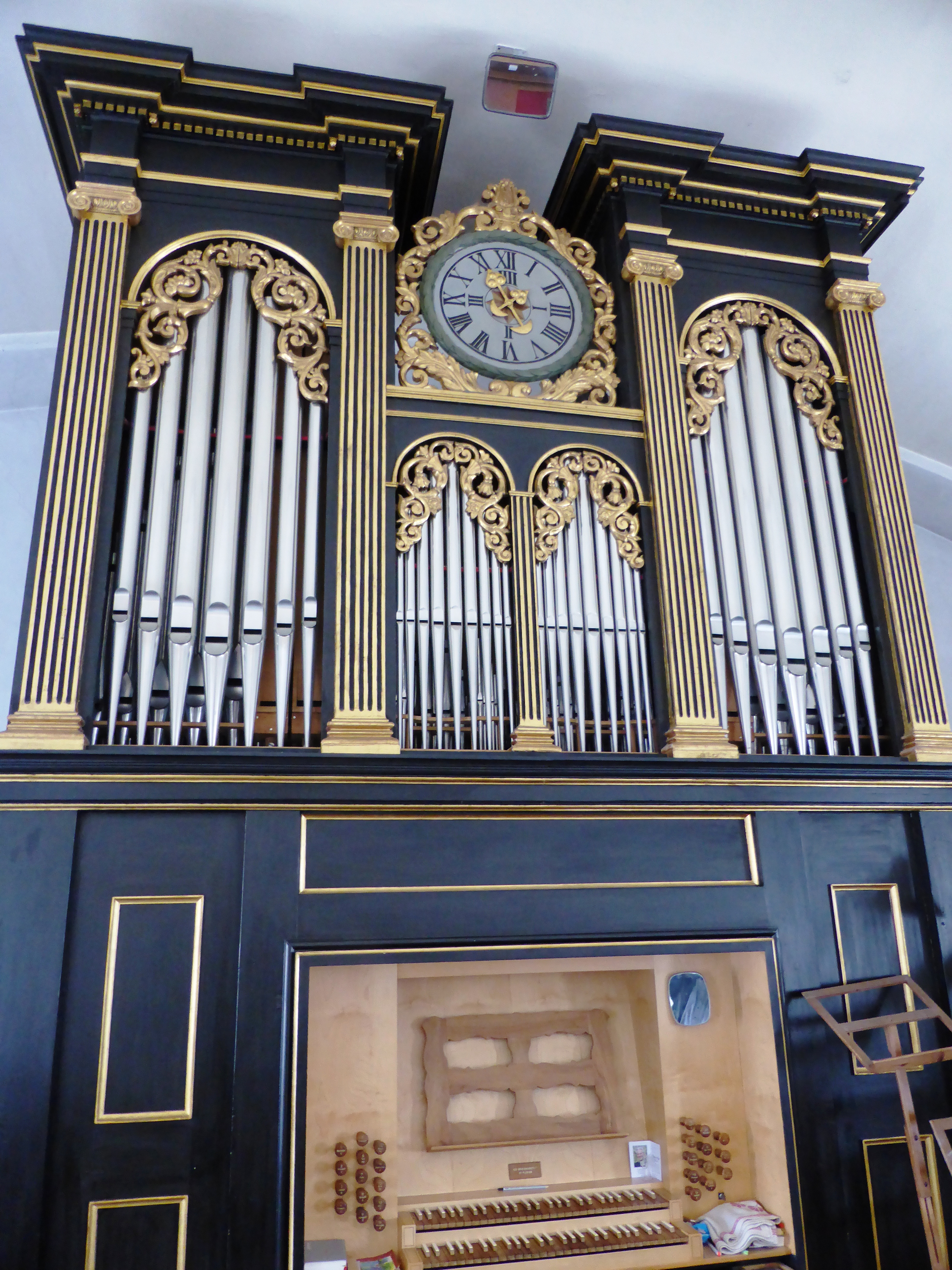 Gehäuse Ludwig Mooser 1847 Werk oö. Orgelbauanstalt 1986 Eugendorf